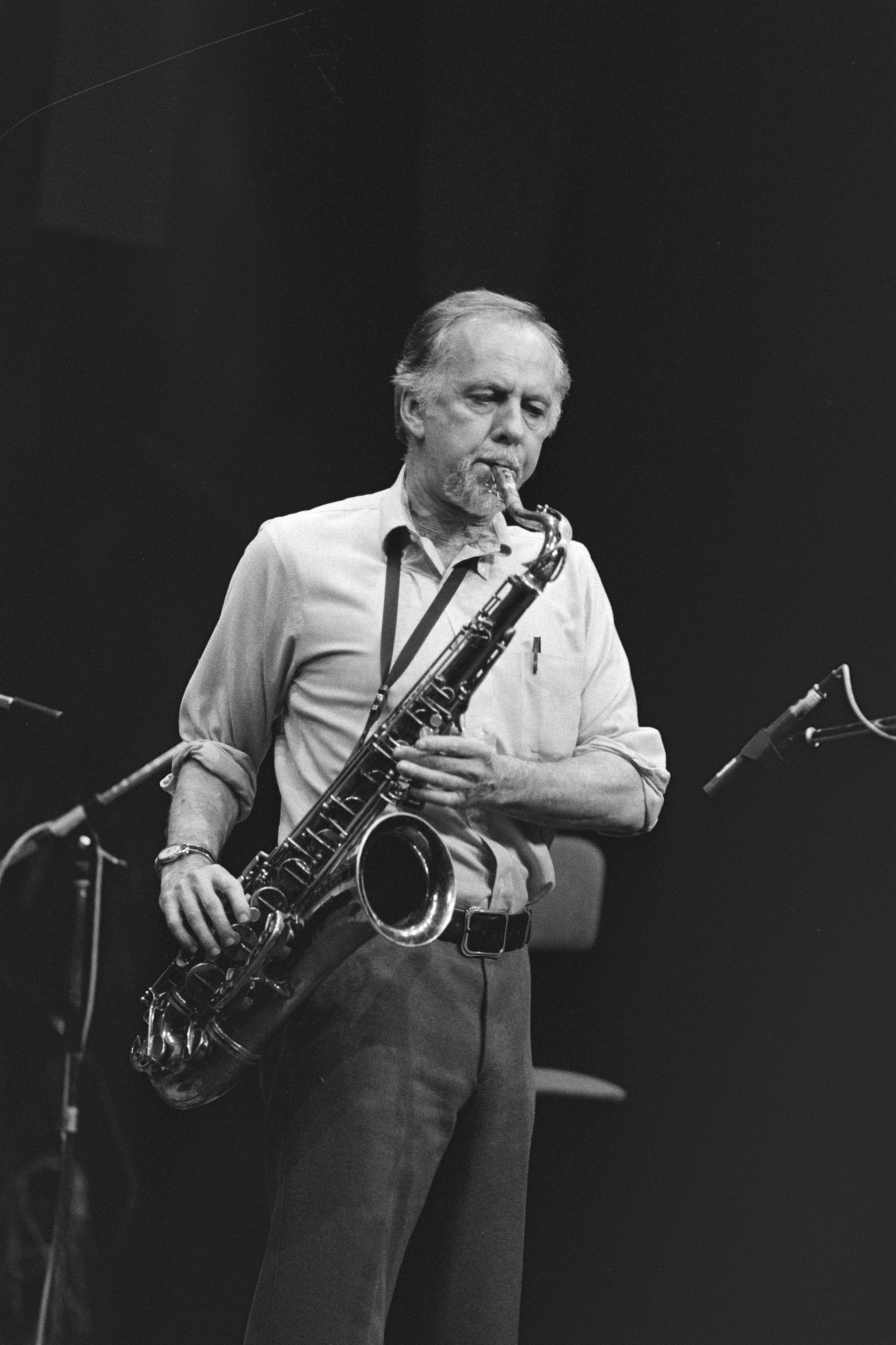 Collectie / Archief : Fotocollectie Anefo Reportage / Serie : [ onbekend ] Beschrijving : Internationale Jazz Festival Amsterdam 12/13/14 augustus Warne Marsh Quartet , Marsh in aktie Datum : 17 augustus 1982 Locatie : Amsterdam, Noord-Holland Trefwoorden : festivals, jazz Fotograaf : Bogaerts, Rob / Anefo Auteursrechthebbende : Nationaal Archief Materiaalsoort : Negatief (zwart/wit) Nummer archiefinventaris : bekijk toegang 2.24.01.05 Bestanddeelnummer : 932-2807